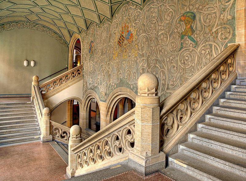 Innenansicht Treppenhaus Gerichtsgebäude Bautzen